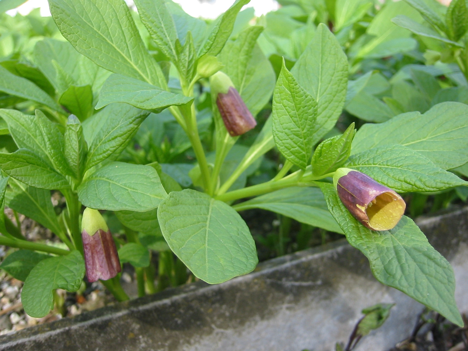 Scopolia carniolica; Botanical Garden Vienna, Austria.